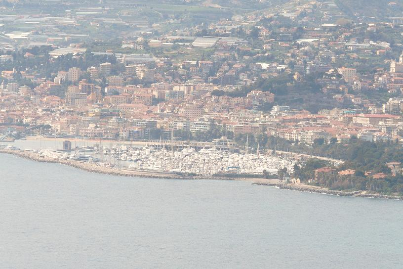 Panorama di Sanremo, Liguria, Italia